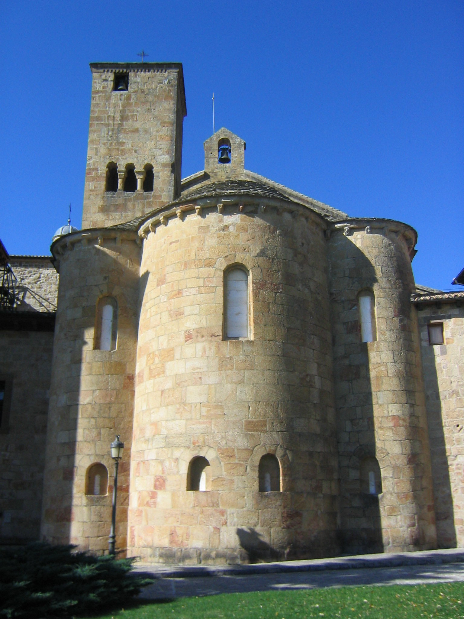 Monasterio de Leyre, ábside de la iglesia, Yesa, Navarra (España).